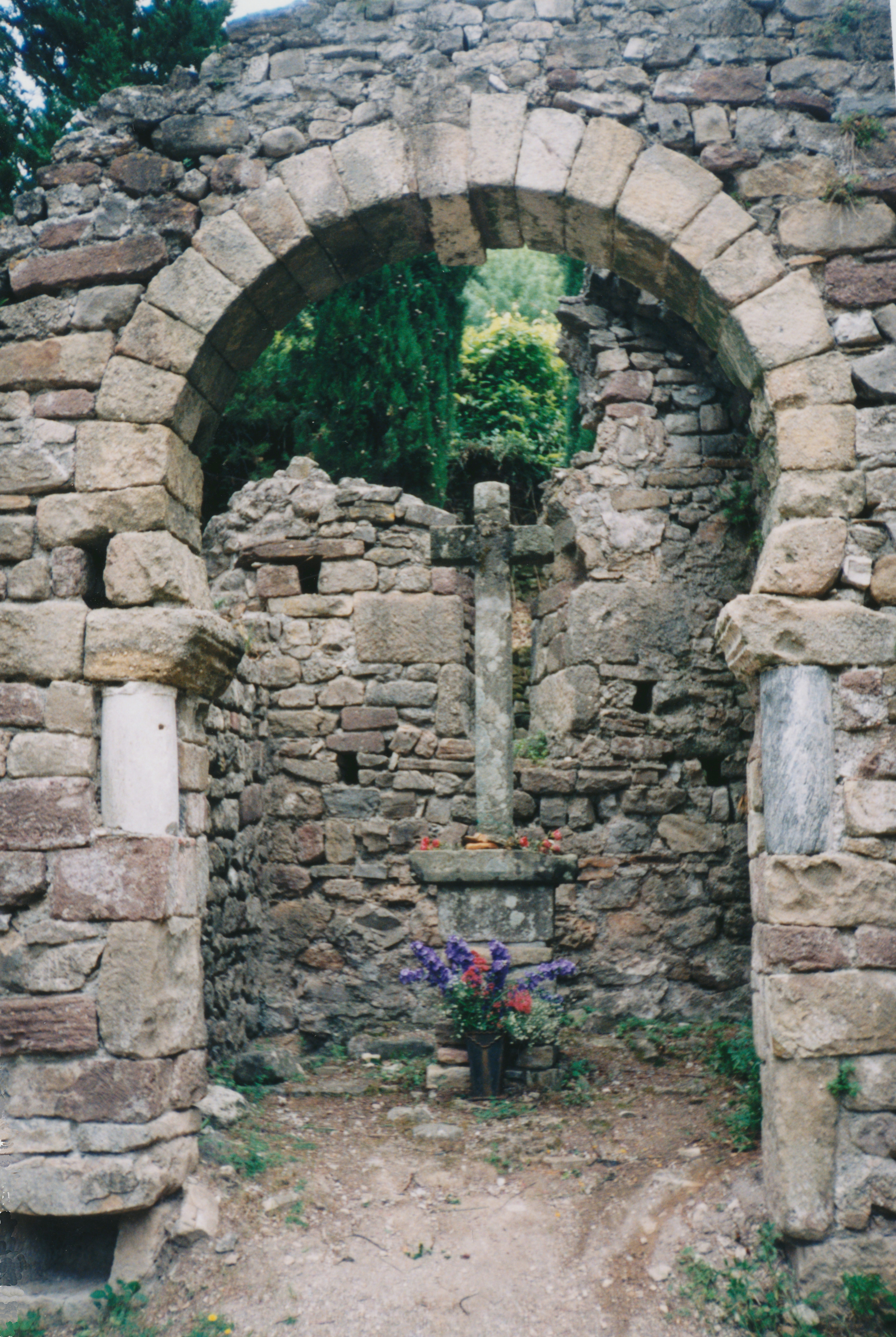 Lunas (Hérault) - chapelle pré-romane Saint-Georges - arc triomphal outrepassé.